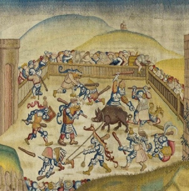 Aveugles chassant un sanglier. Détail de la tapisserie de Saint Martin et les mendiants.